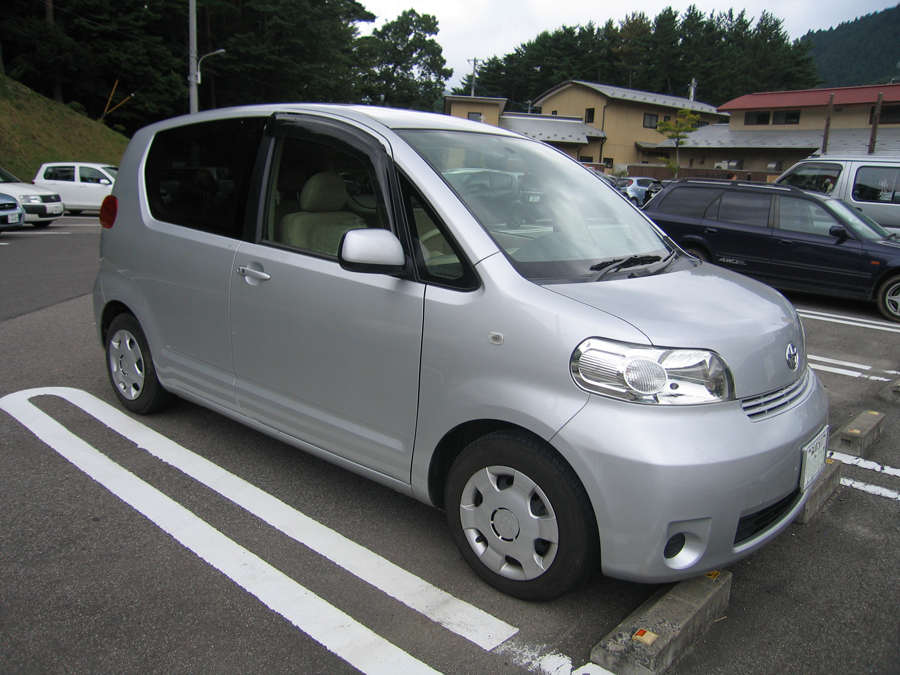 Une Toyota Porte